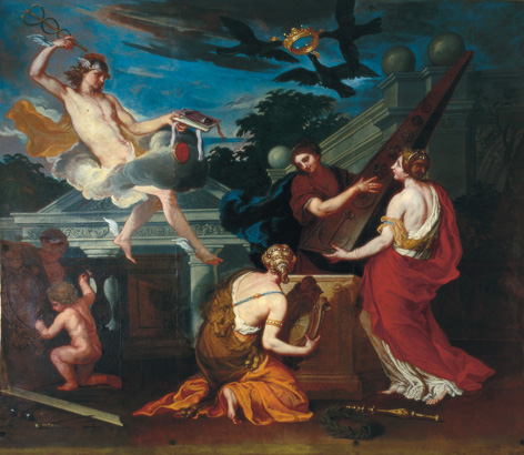 Hans Adam Weissenkircher, Merkur, Schloss Eggenberg Planetensaal